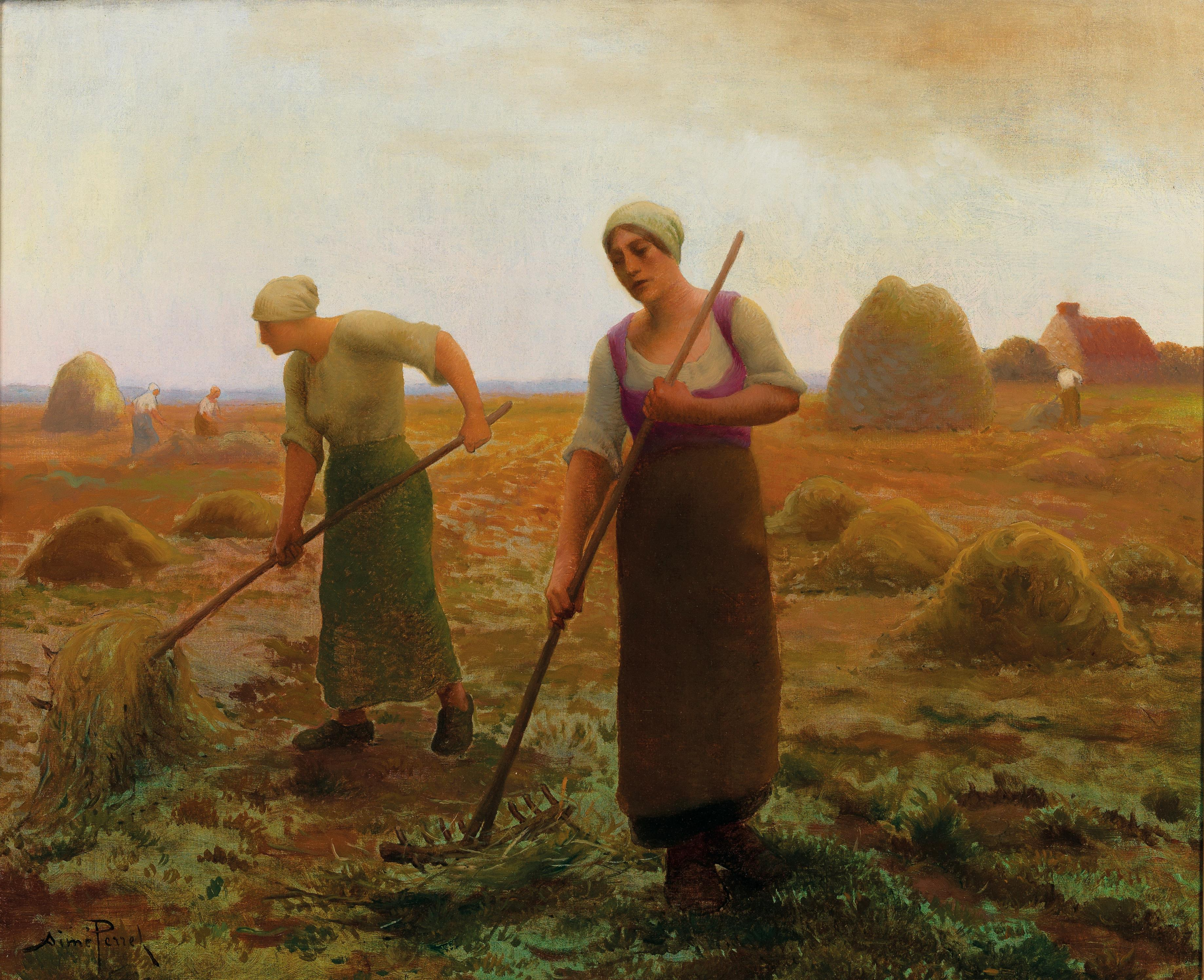 Erntehelferinnen